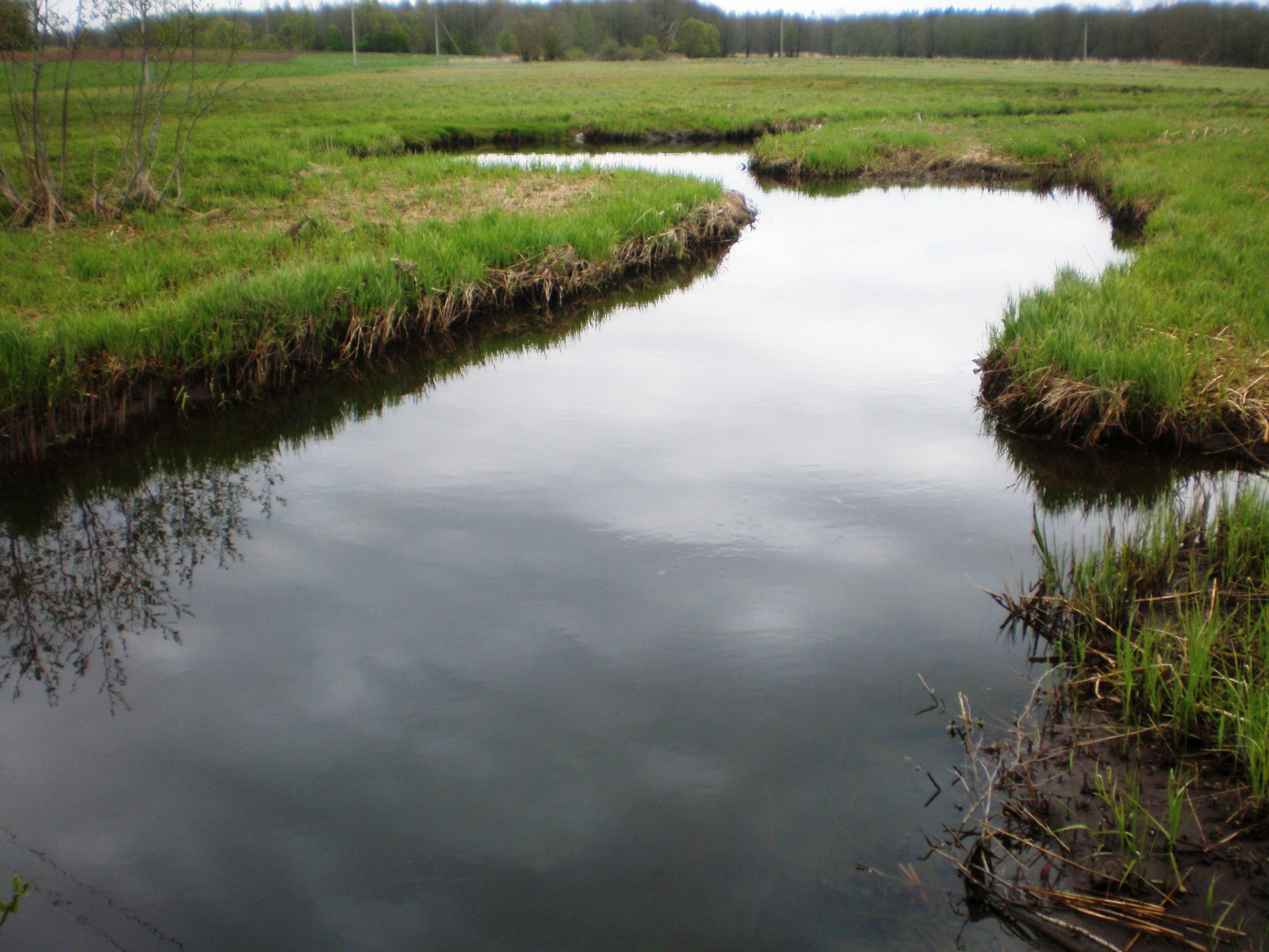 Virinta ties Naujasodžiu 2007.05.04 Foto: Hugo.arg